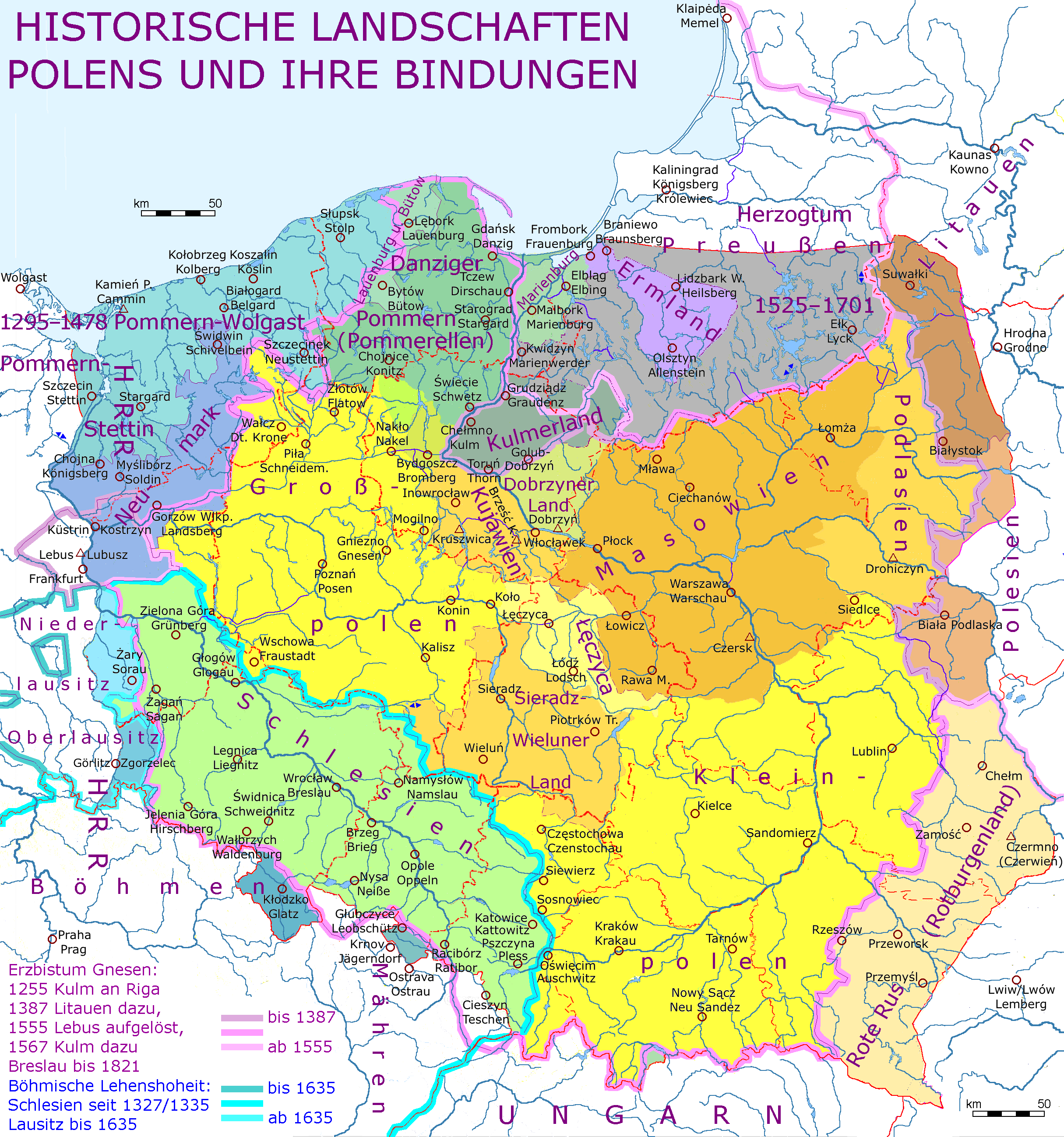 Historische Regionen Polens und ihre Bindungen; unterlegt mit Gewässernetz